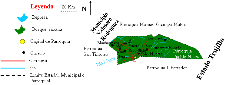 Mapa de la Parroquia Pueblo Nuevo, Municipio Batalt, Estado Zulia, Venezuela